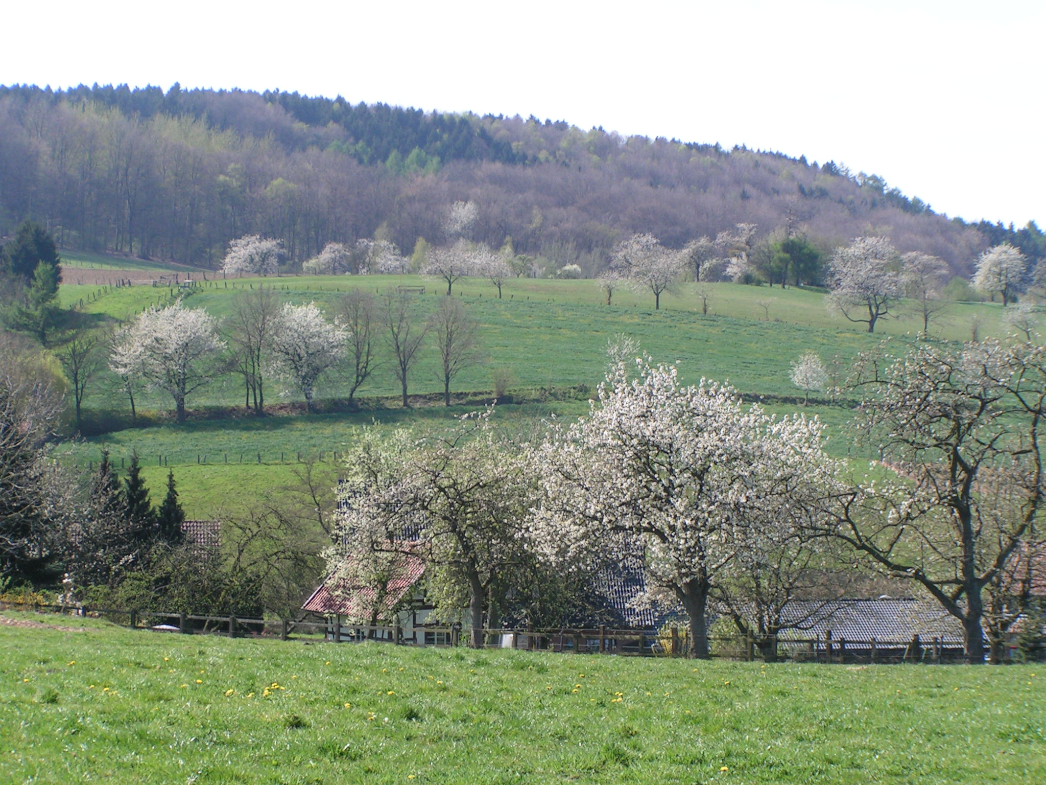 Kirschblüte im Forellental in Hagen am Teutoburger Wald